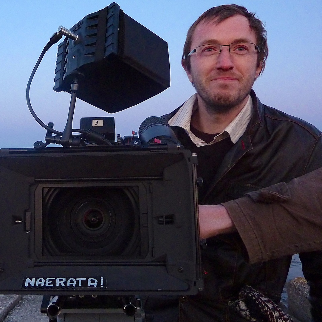 Kaamera test Paljassaares, Tallinn